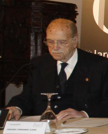 Xerardo Fernández Albor, político galego e ex-presidente da Xunta de Galicia.